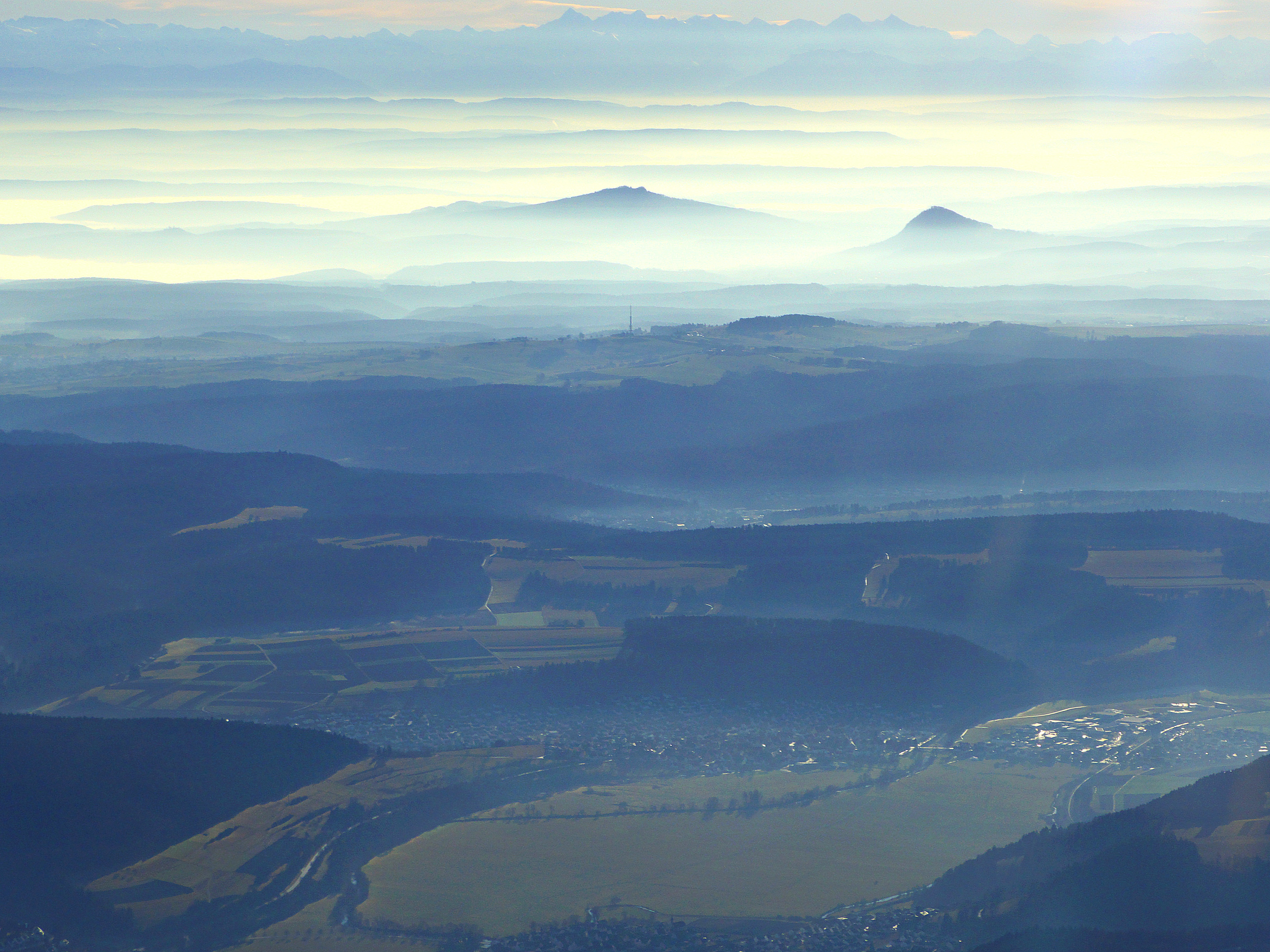 Hegau